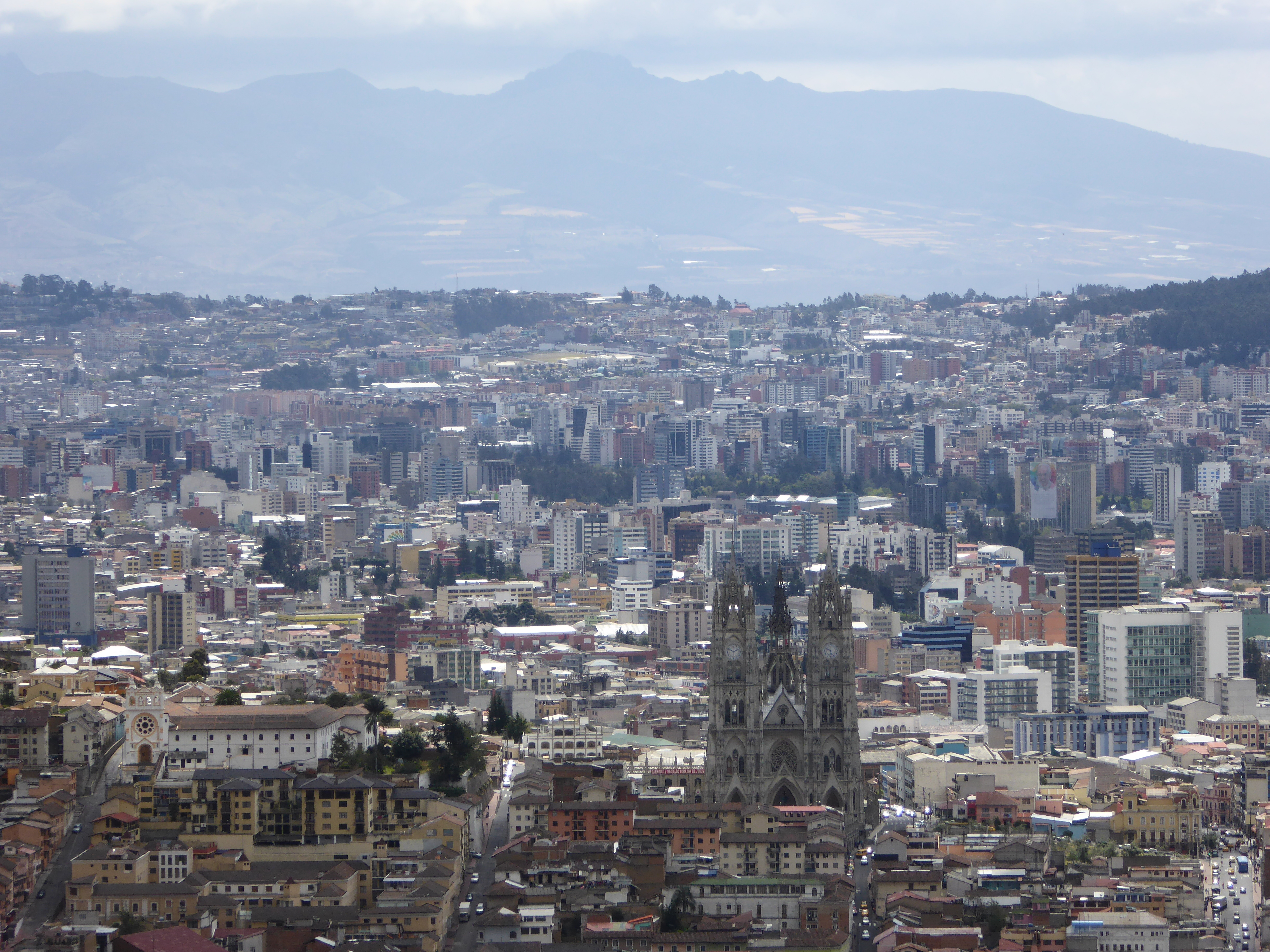 Blick von der Junfgrau von Quito